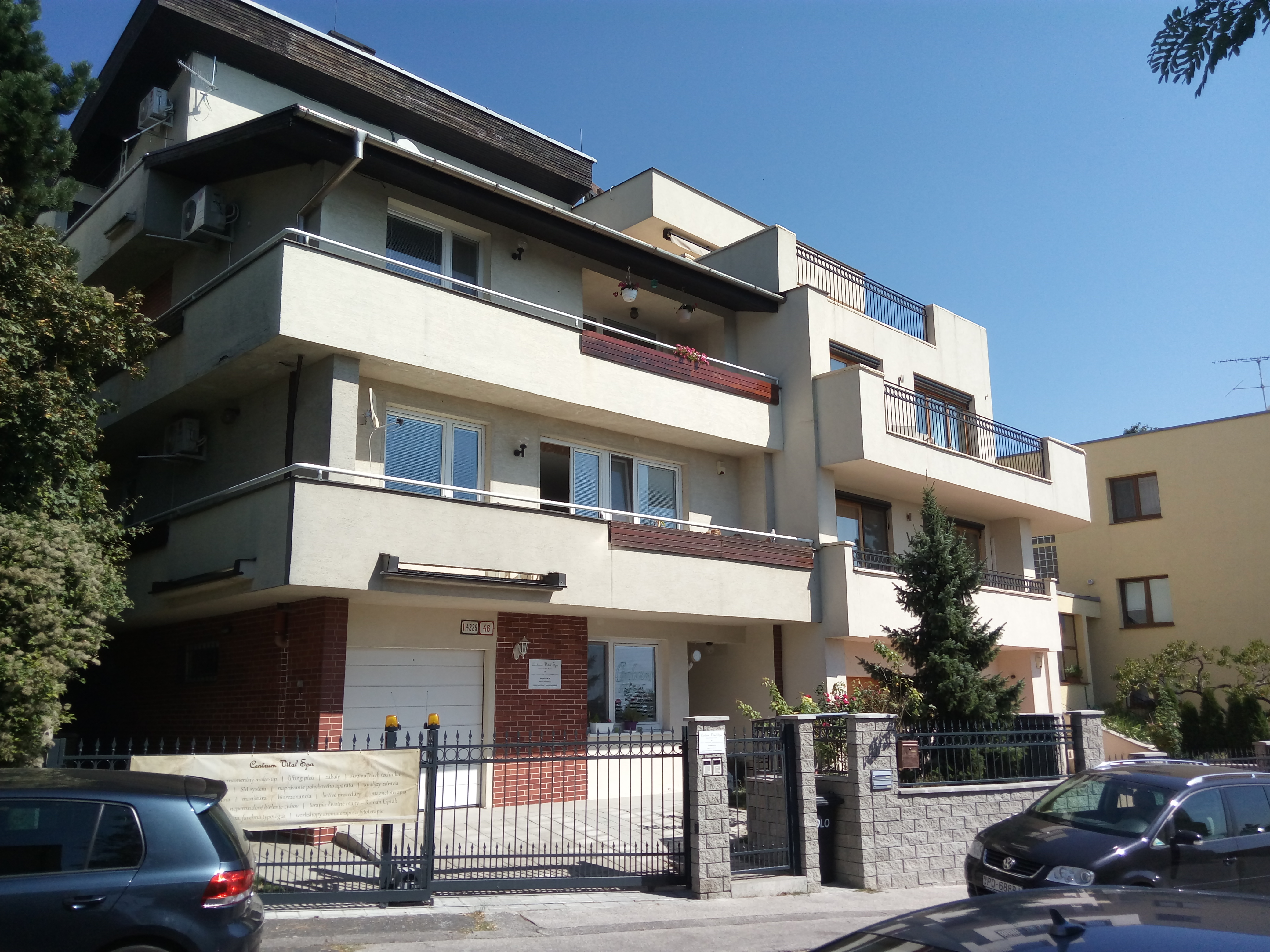 Radvanská 46, Staré Mesto, Bratislava